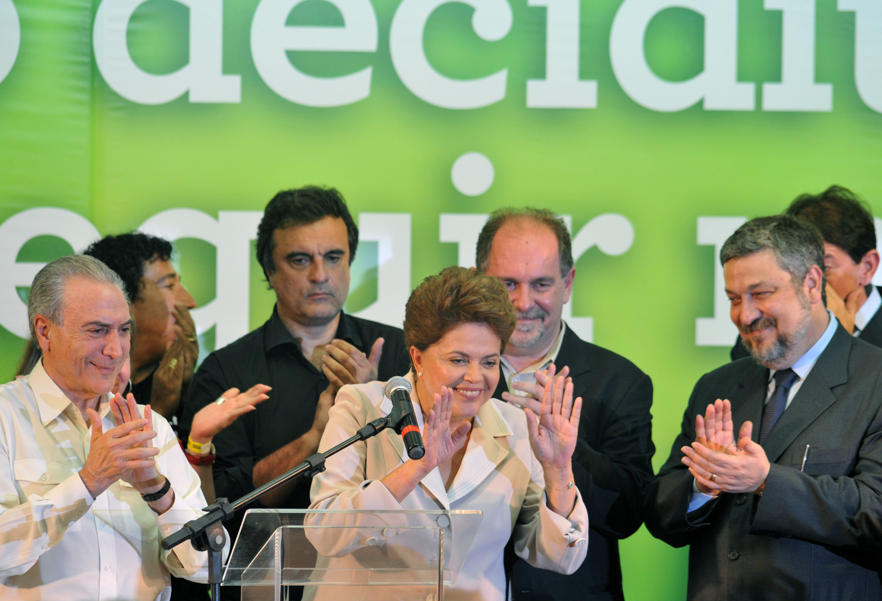 Dilma Rousseff faz o primeiro pronunciamento como presidente eleita do Brasil